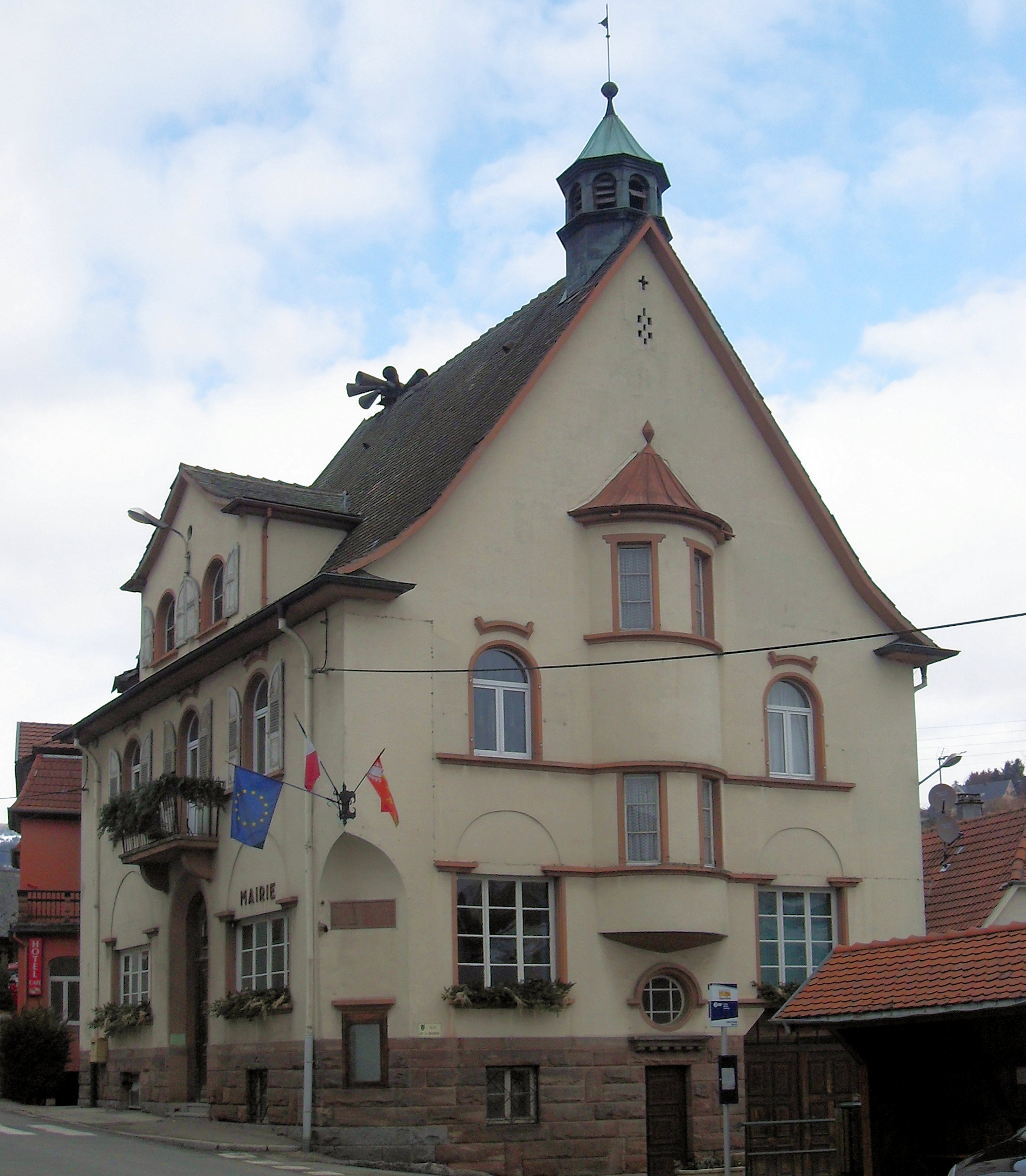 La mairie de Soultzeren